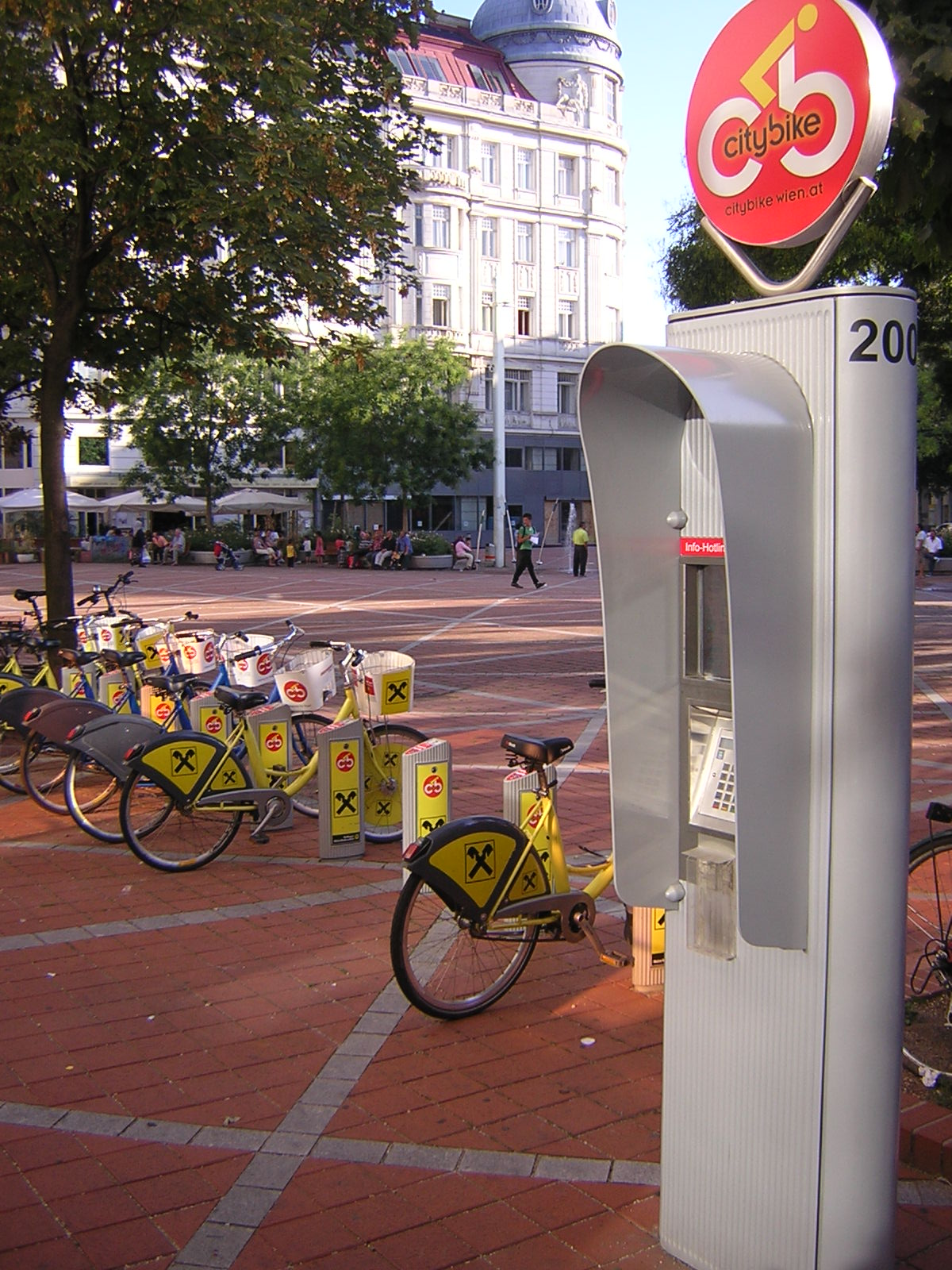 Citybike Station am Wallensteinplatz in Wien